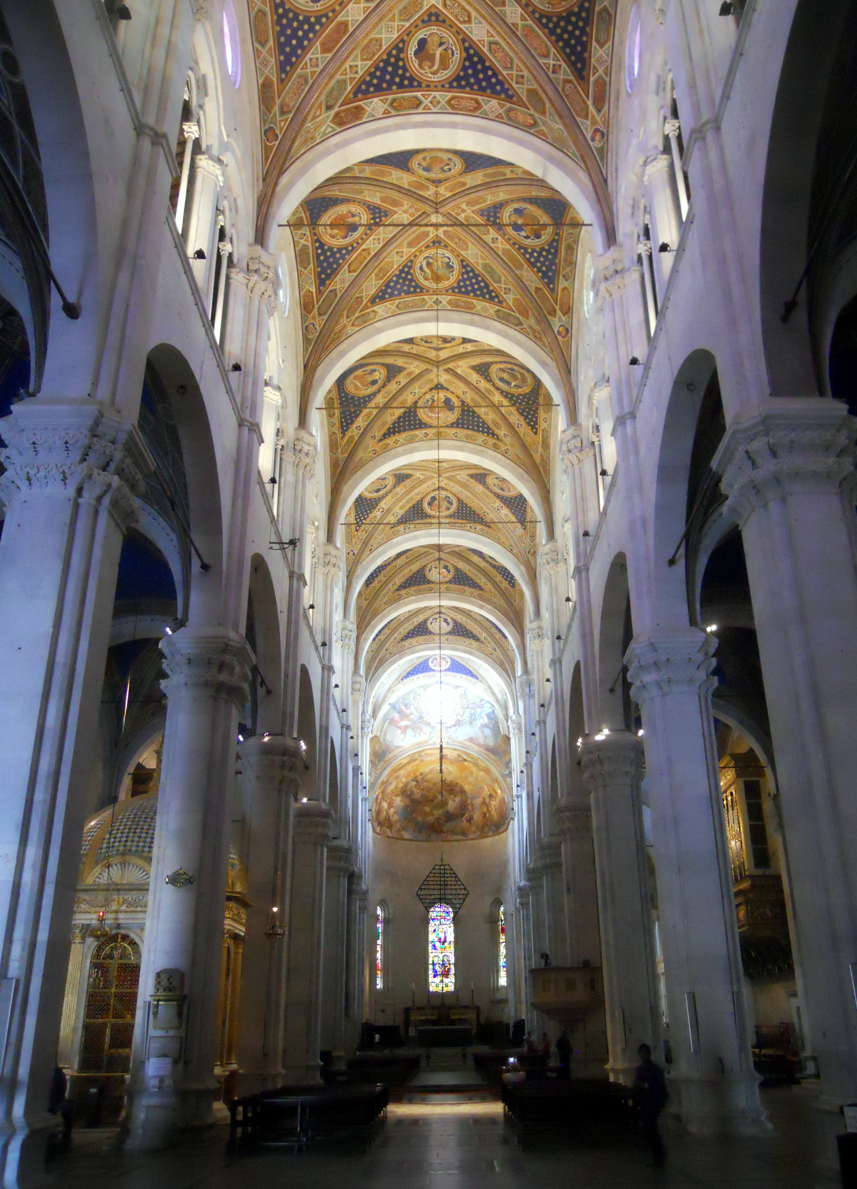 L'interno della cattedrale di San Martino a Lucca